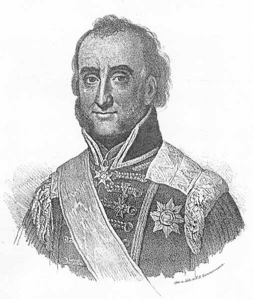 Sigismund August Wolfgang von Herder (1776–1838)